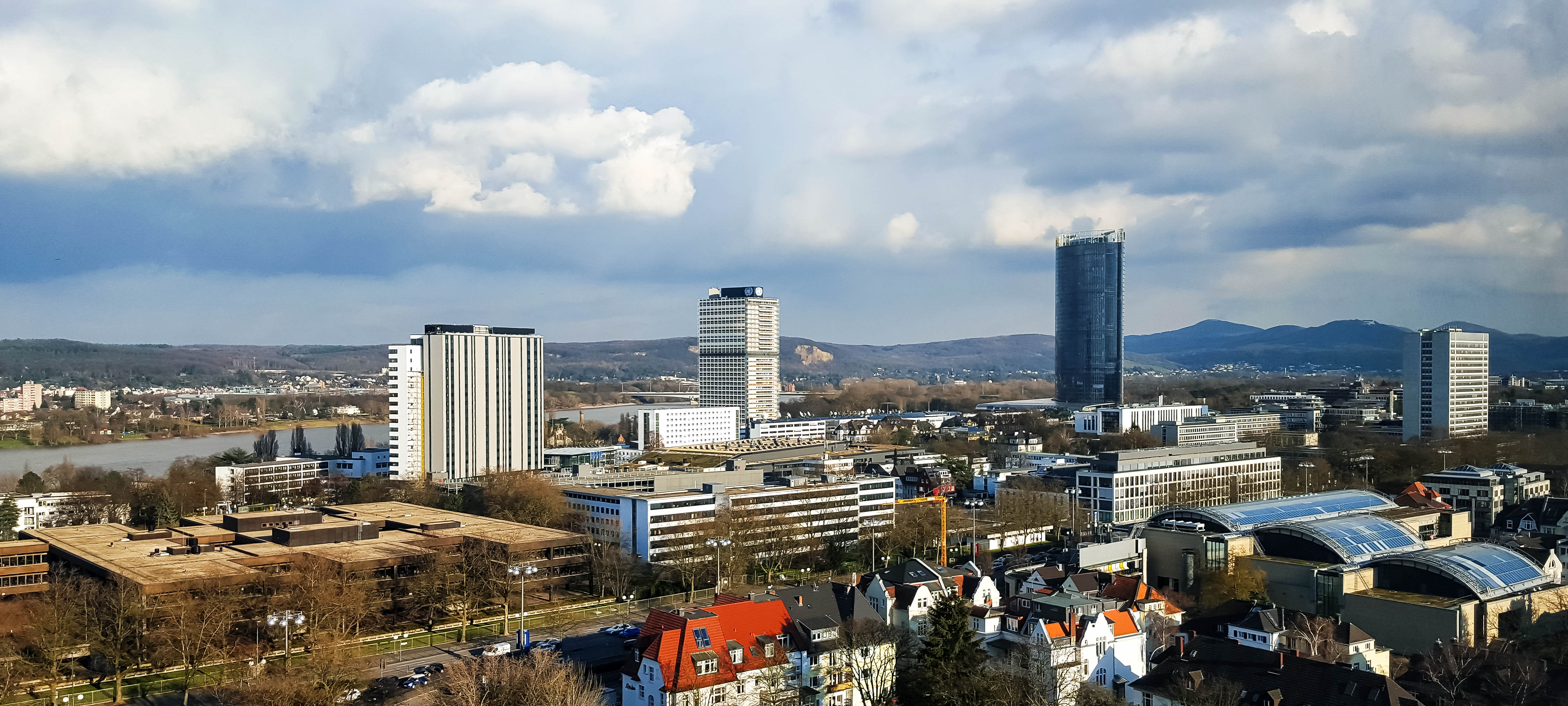 Blick aus dem Bonn-Center, dem Bonner Gegenstück zum Berliner Europa-Center, am Bundeskanzlerplatz.